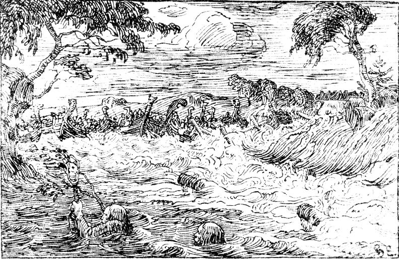 Halfdan Egedius: Illustration for Olav den helliges saga. Snorre 1899-edition. «Vandene styrtede sig med Fossefald imod Kong Knuts Skib og Folk.» nb: «Vannet flommet som en foss mot kong Knuts skip og folk.» nn: «Vatnet kom fossande over skipsflåten til kong Knut.»